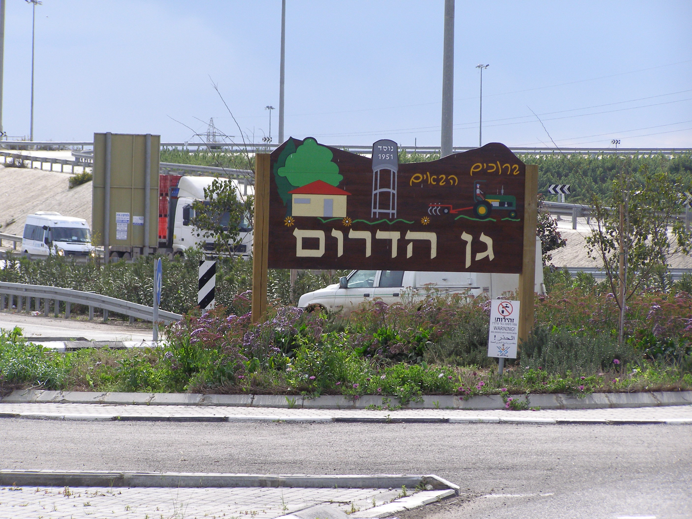 GanHaDddg